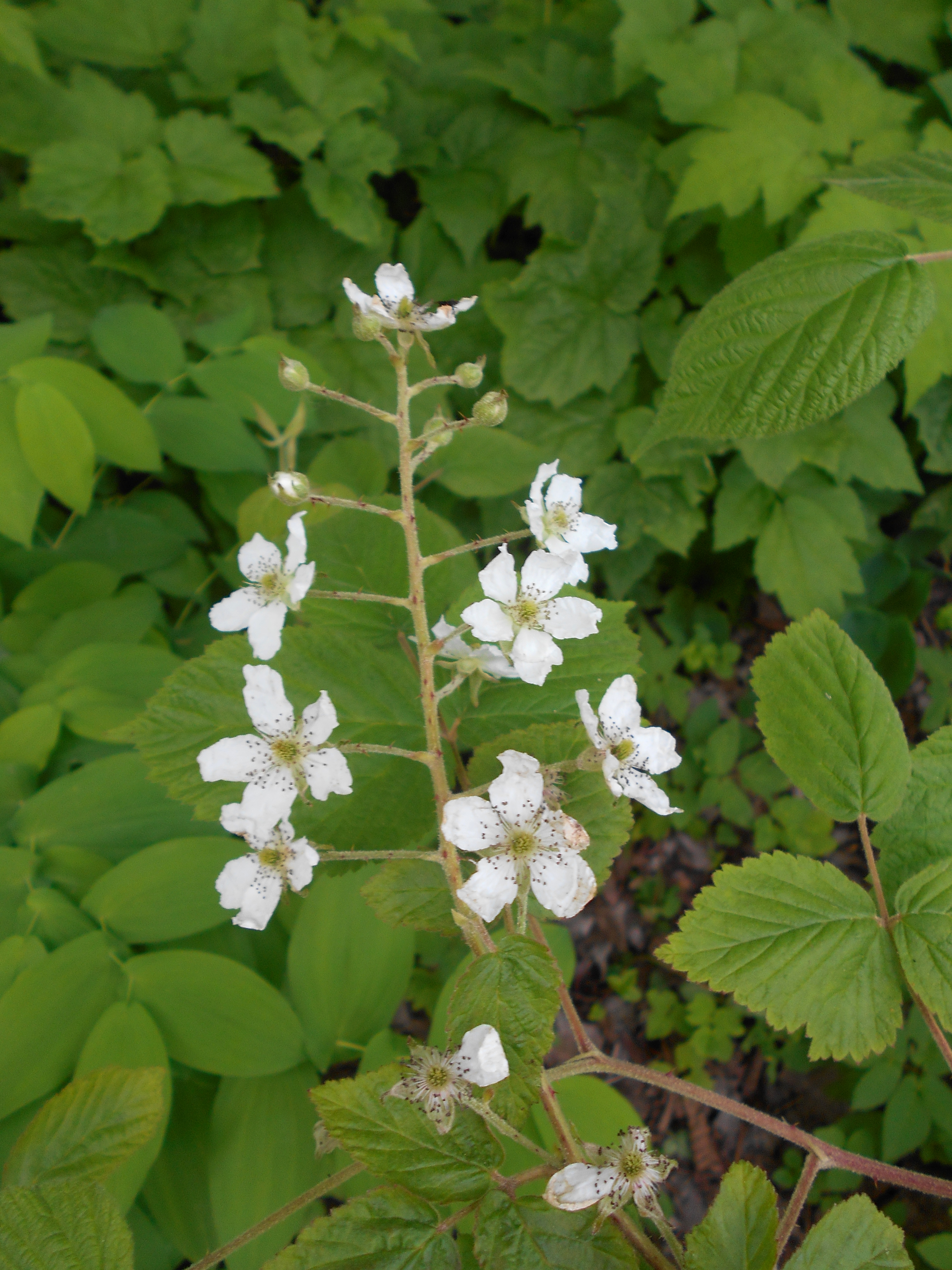 Rubus allegheniensis, Botanischer Garten Berlin.